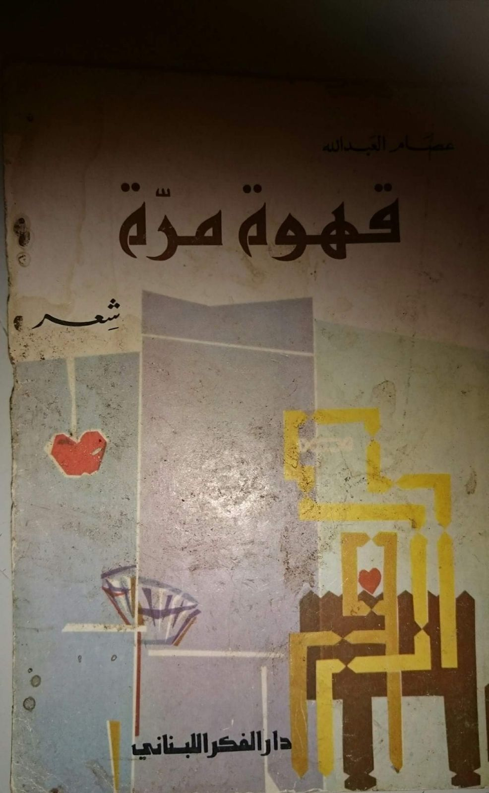 كتاب ديوان مقام الصوت